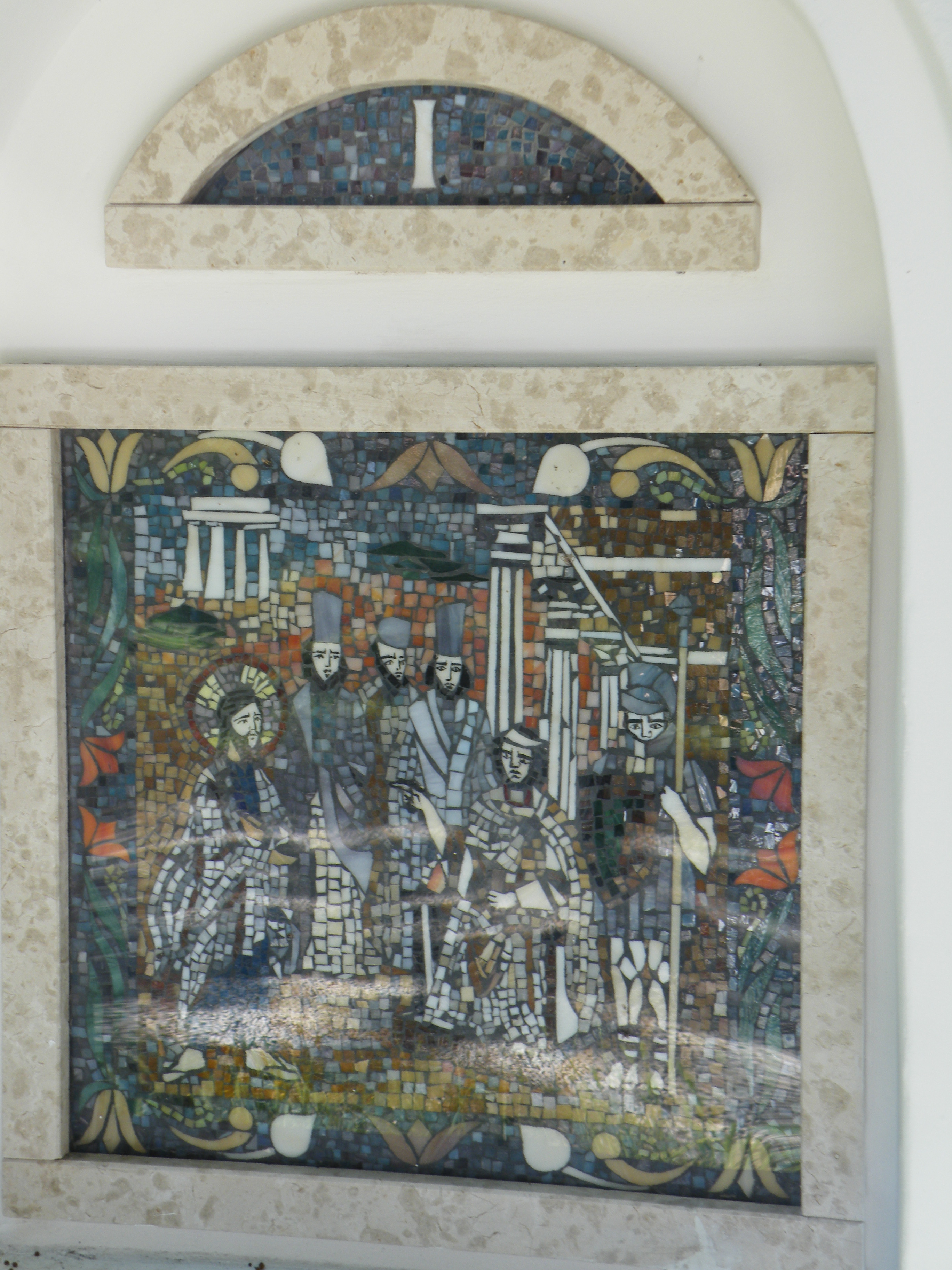 Stációk a Palóc ligetben, Balassagyarmaton